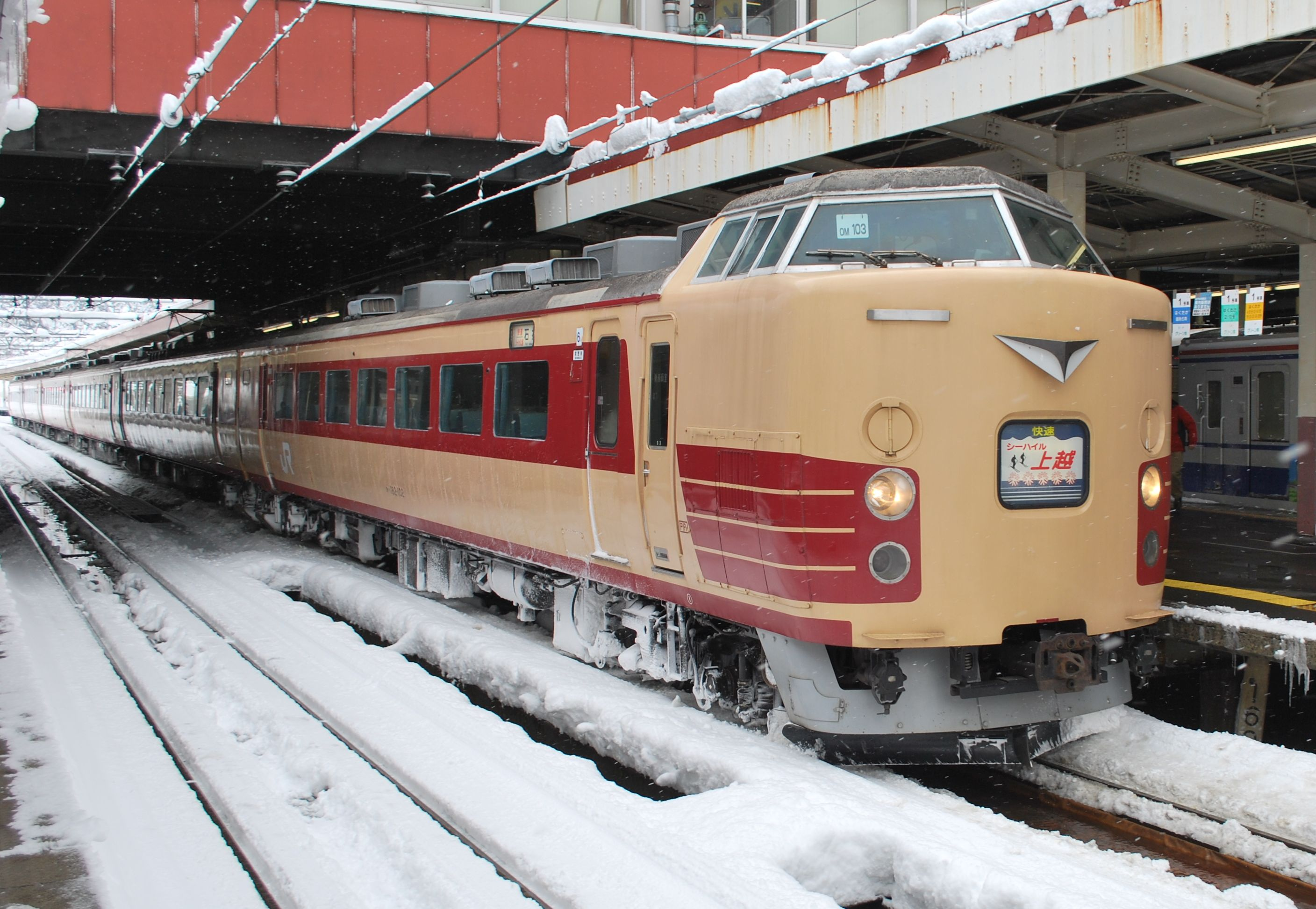 シーハイル上越号石打行。2013年までは183系で運転されていた。ヘッドマークつき。越後湯沢駅で撮影。